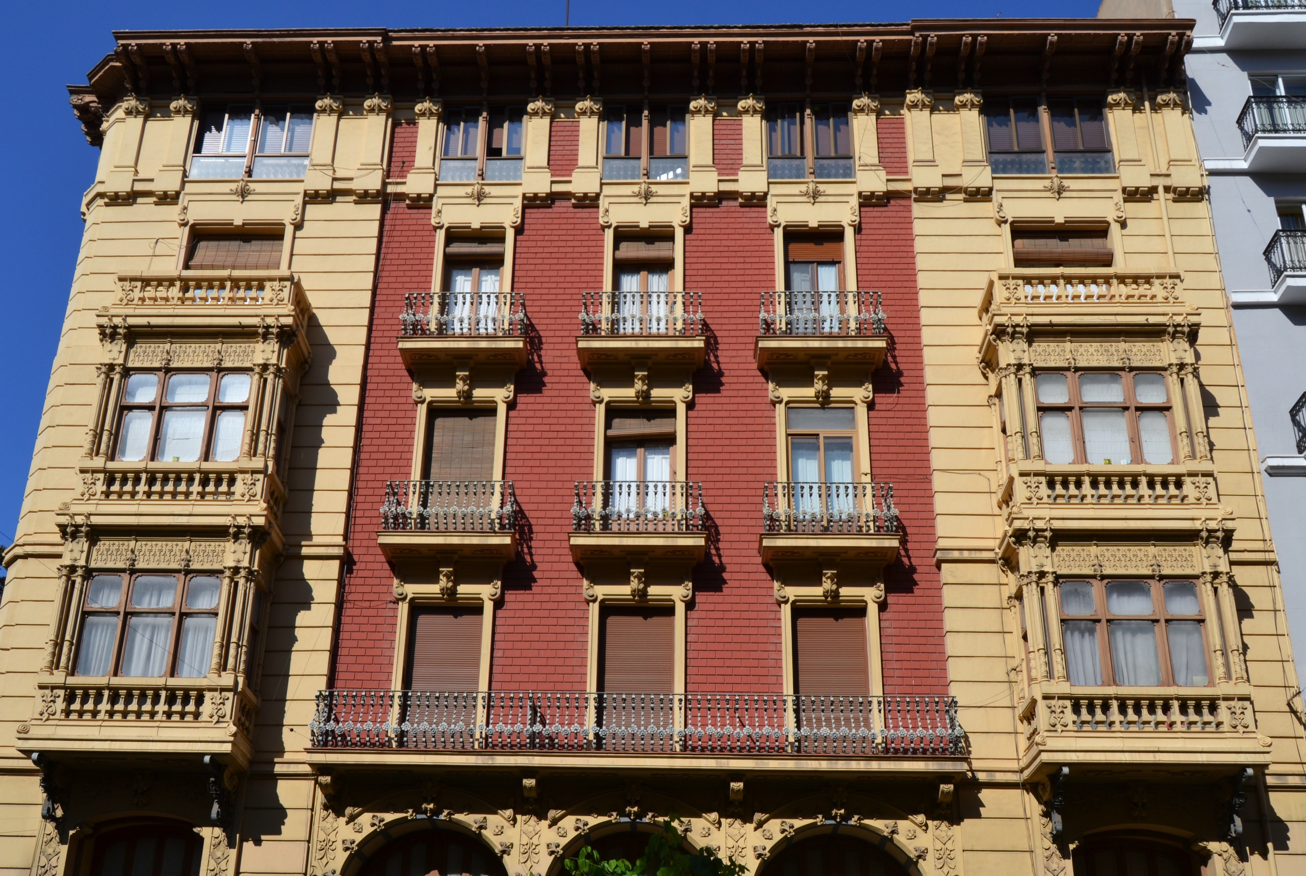 Façana de la Rambla de la casa de l'Ascensor, Alacant.